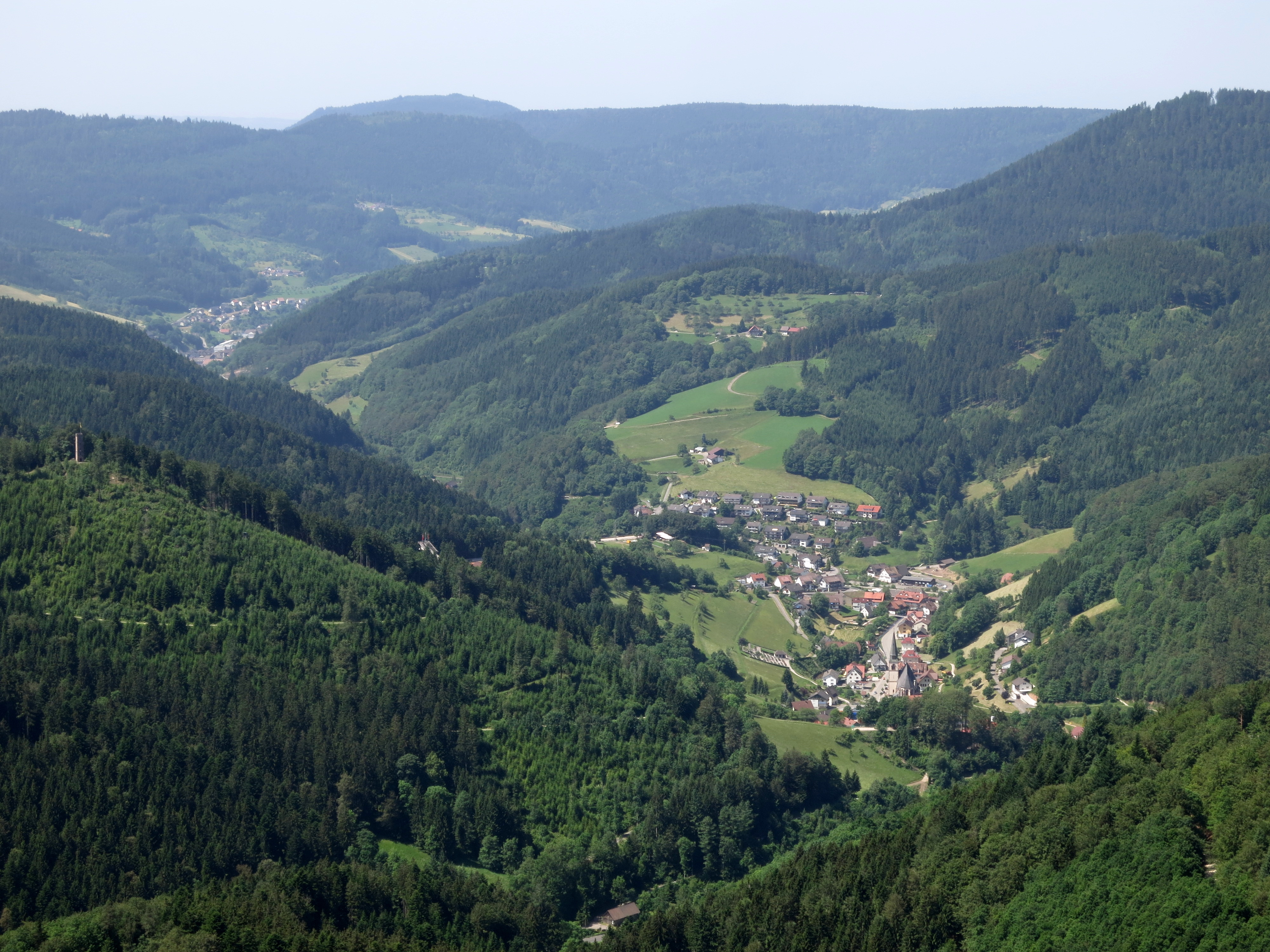 Blick vom Bauernkopf auf Bad Griesbach und das Renchtal.